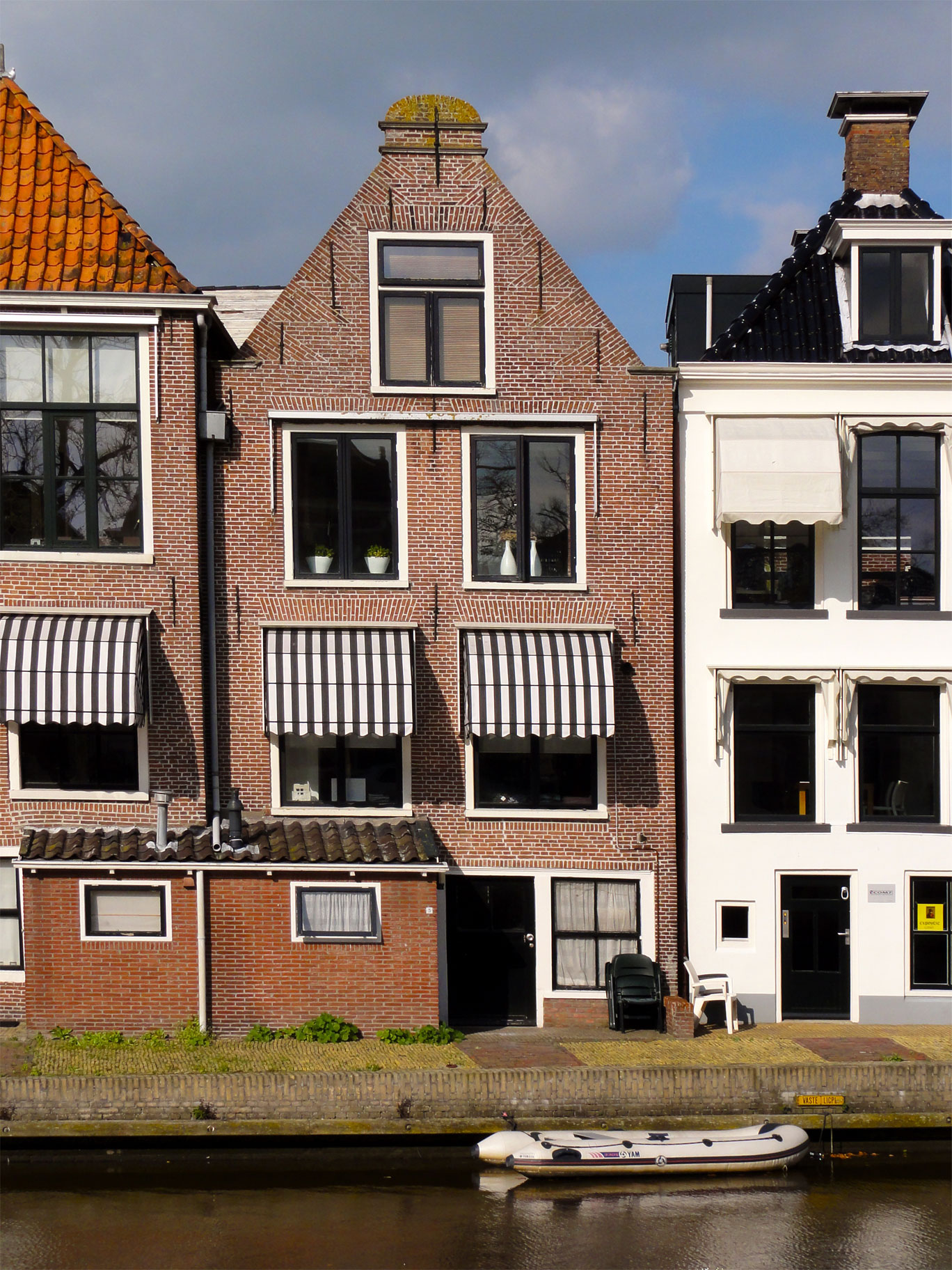 Achtergevel Nauwstraat 5 Dokkum, rijksmonument